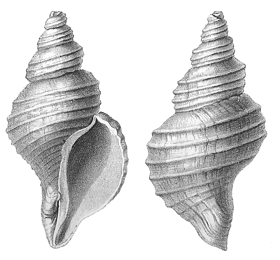 Neptunea despecta - Fossil gastropod from Pliocene deposits near Antwerp (Belgium)